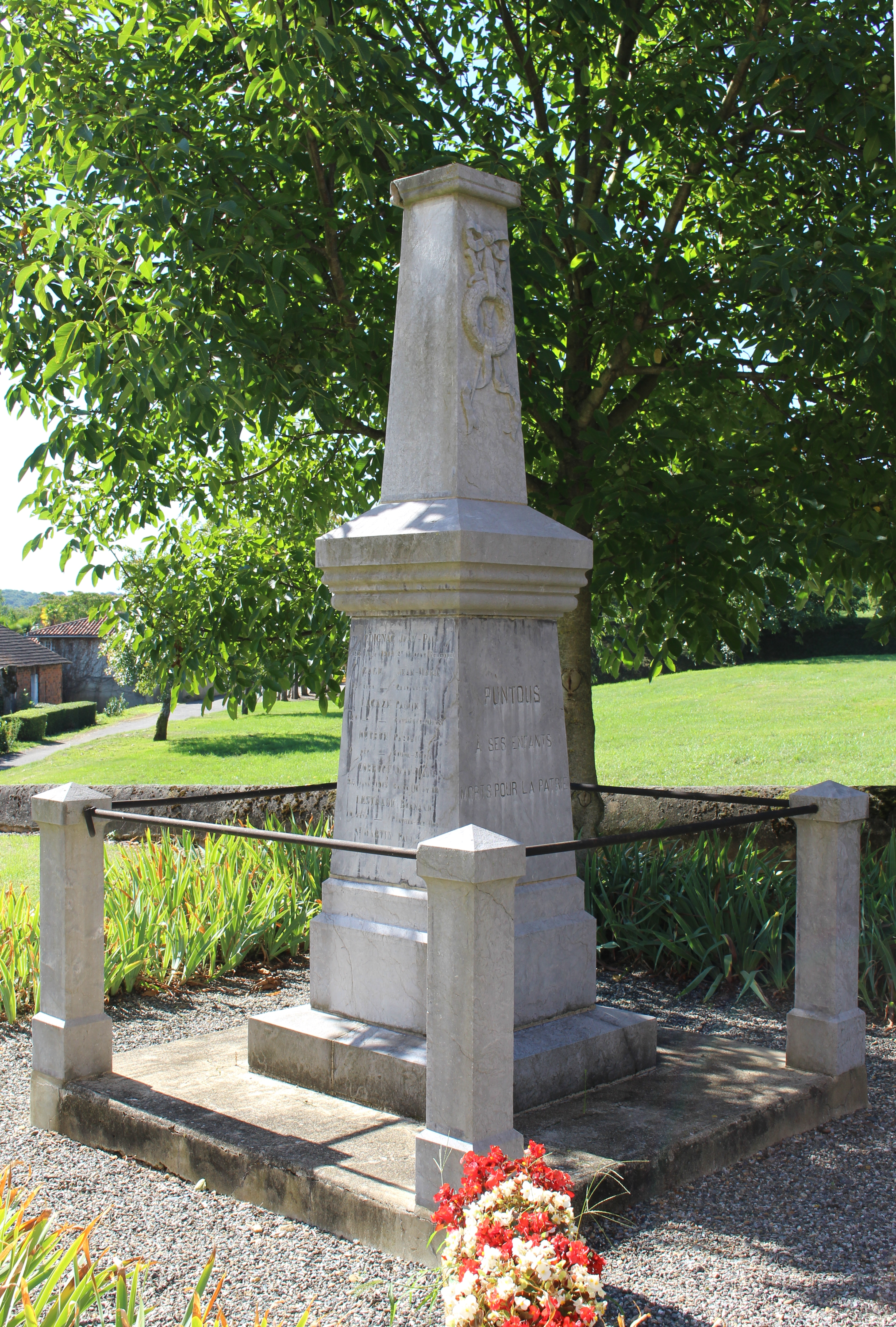 Monument aux morts de Puntous (Hautes-Pyrénées)